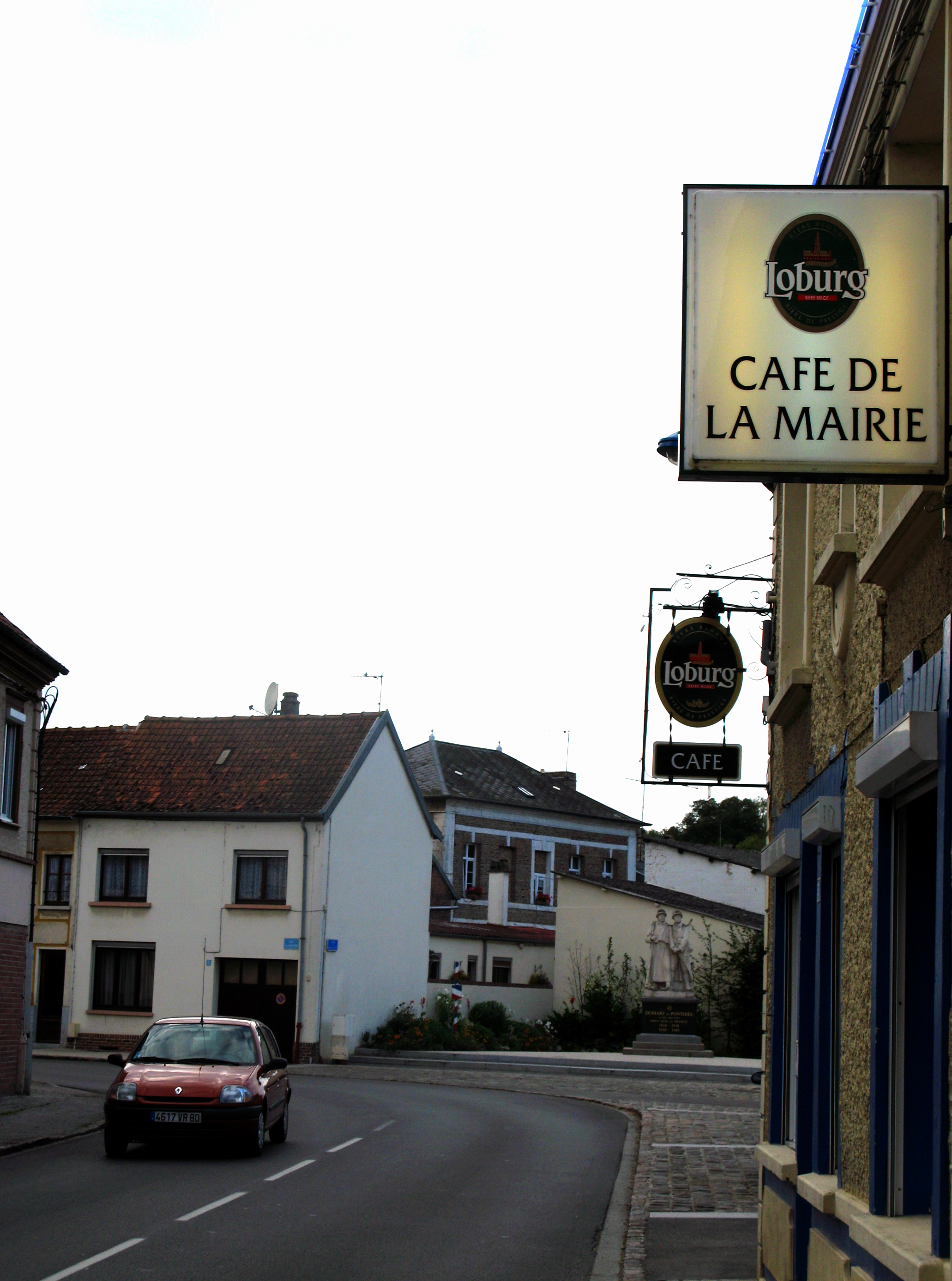 Domart-en-Ponthieu (Somme, France) - Le Monument aux Morts, juste dans l'axe de la rue "Gaston Morin" (rue principale traversant le centre, passant devant la poste et la mairie).